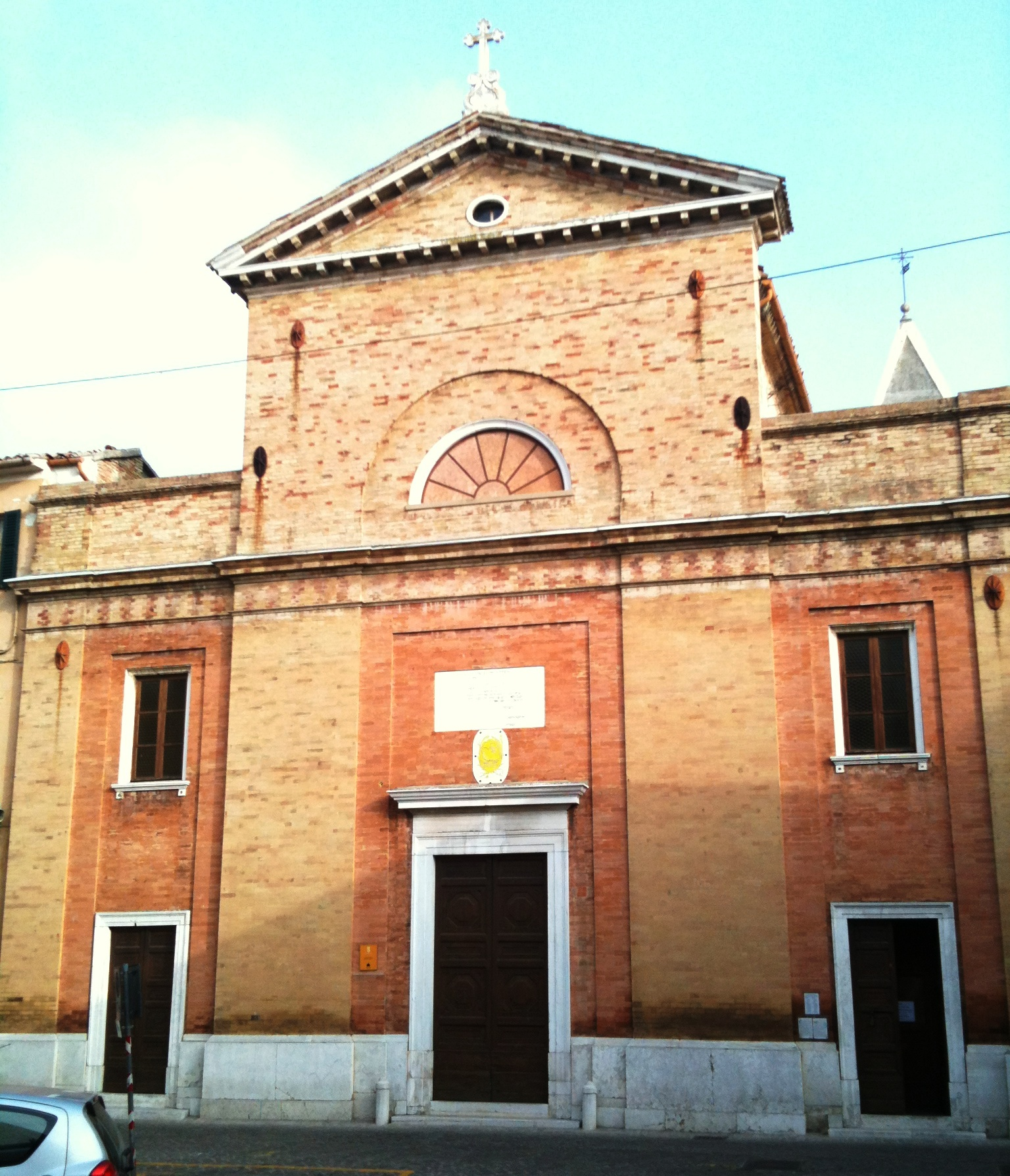 Facciata della Basilica Collegiata di Santa Croce in Ostra (AN)